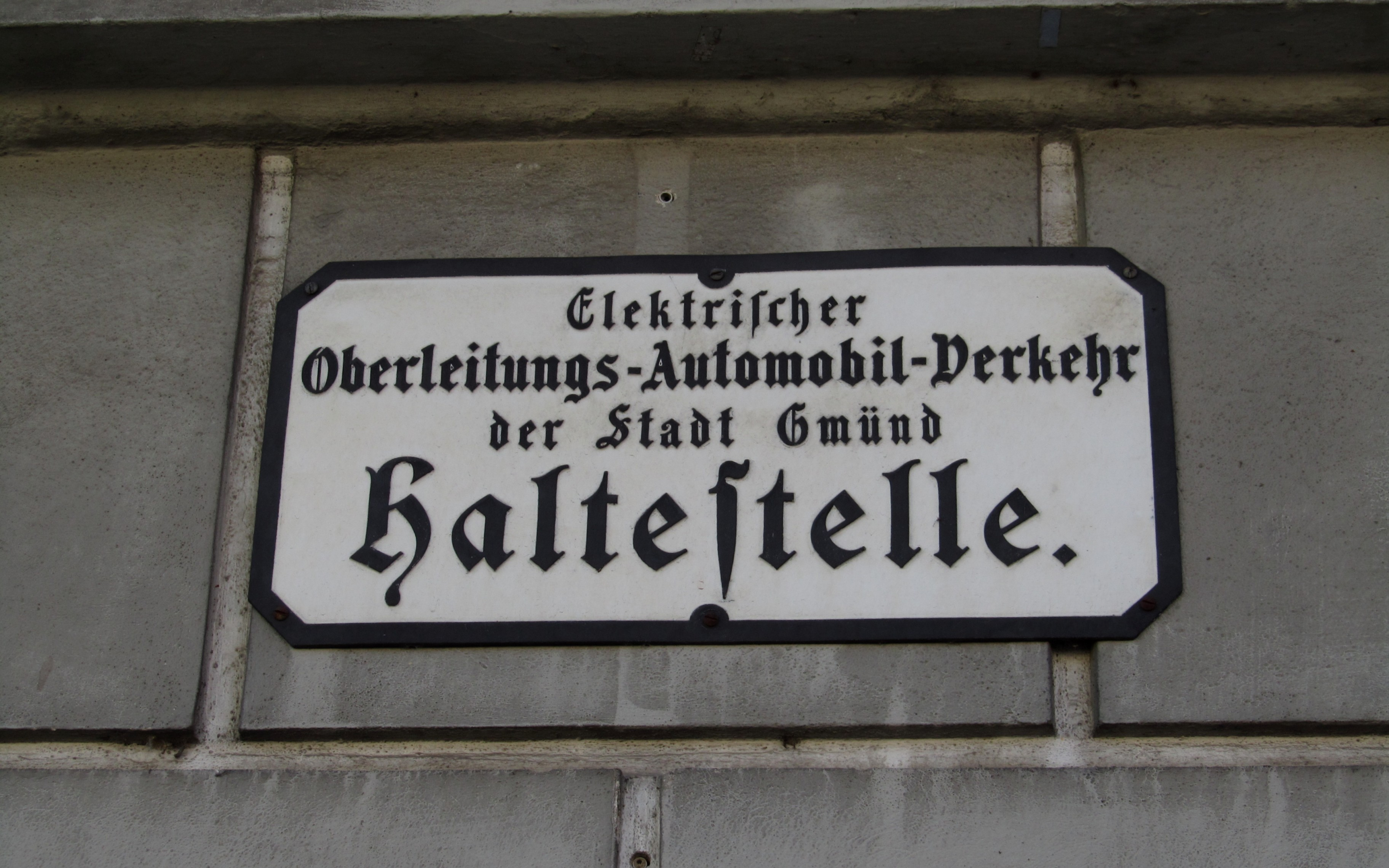 Alte Post